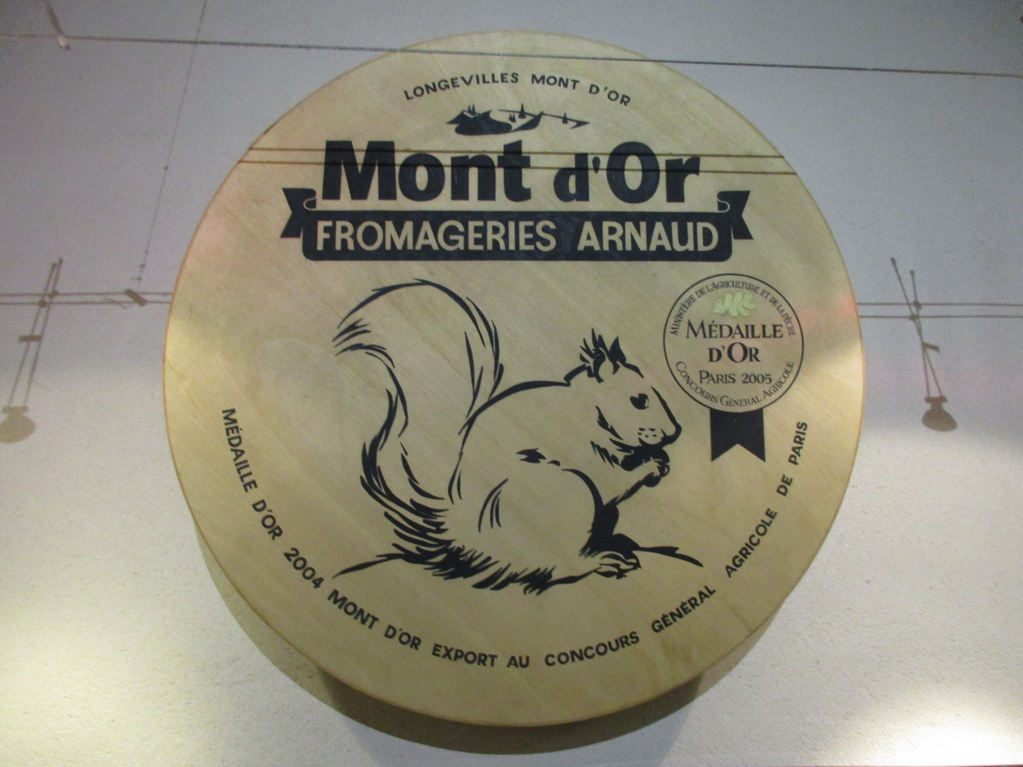 Boite de Mont d'Or des caves d'affinage Juraflore du Fort des Rousses